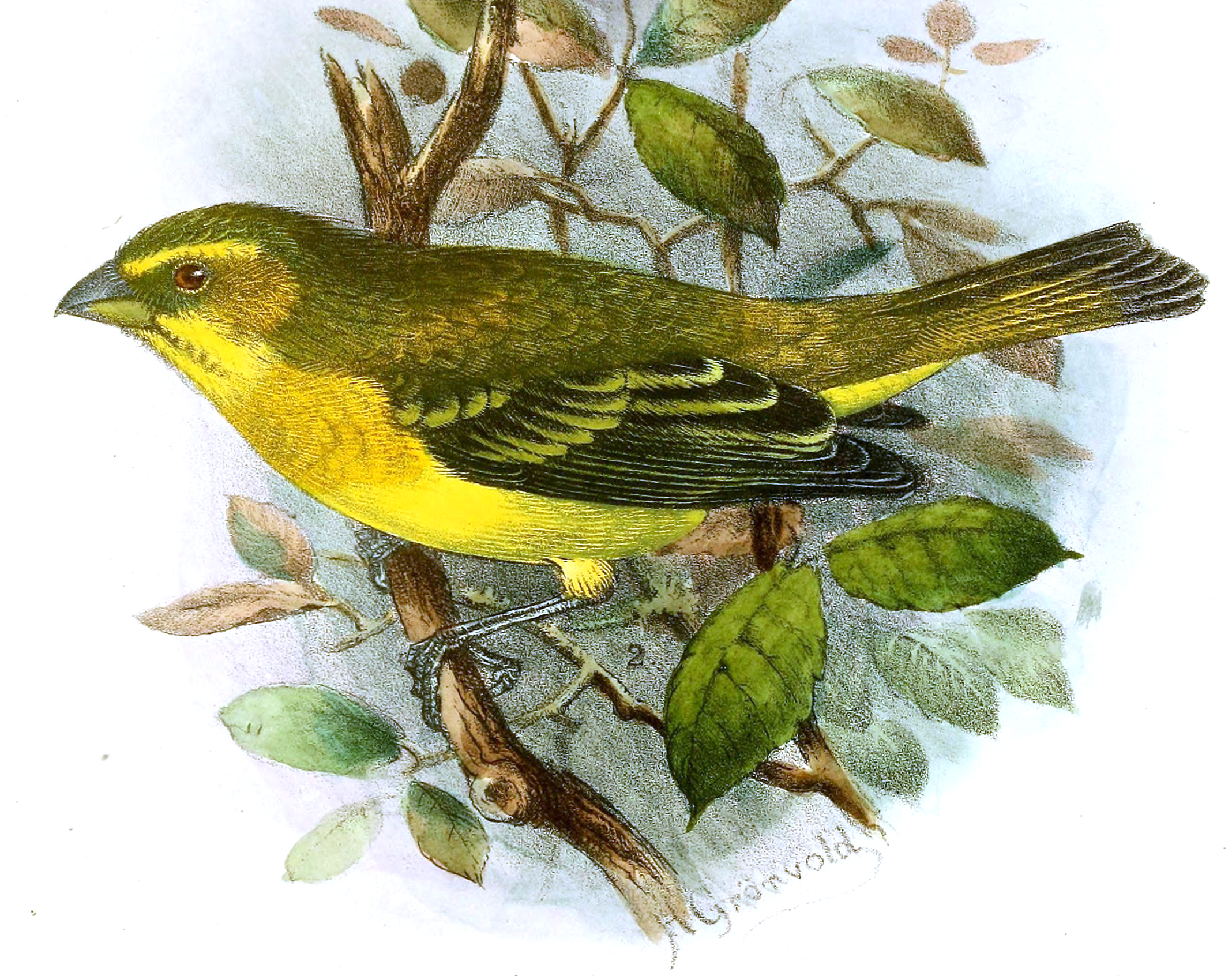 Serinus sulphuratus sharpii - Serinus sharpei